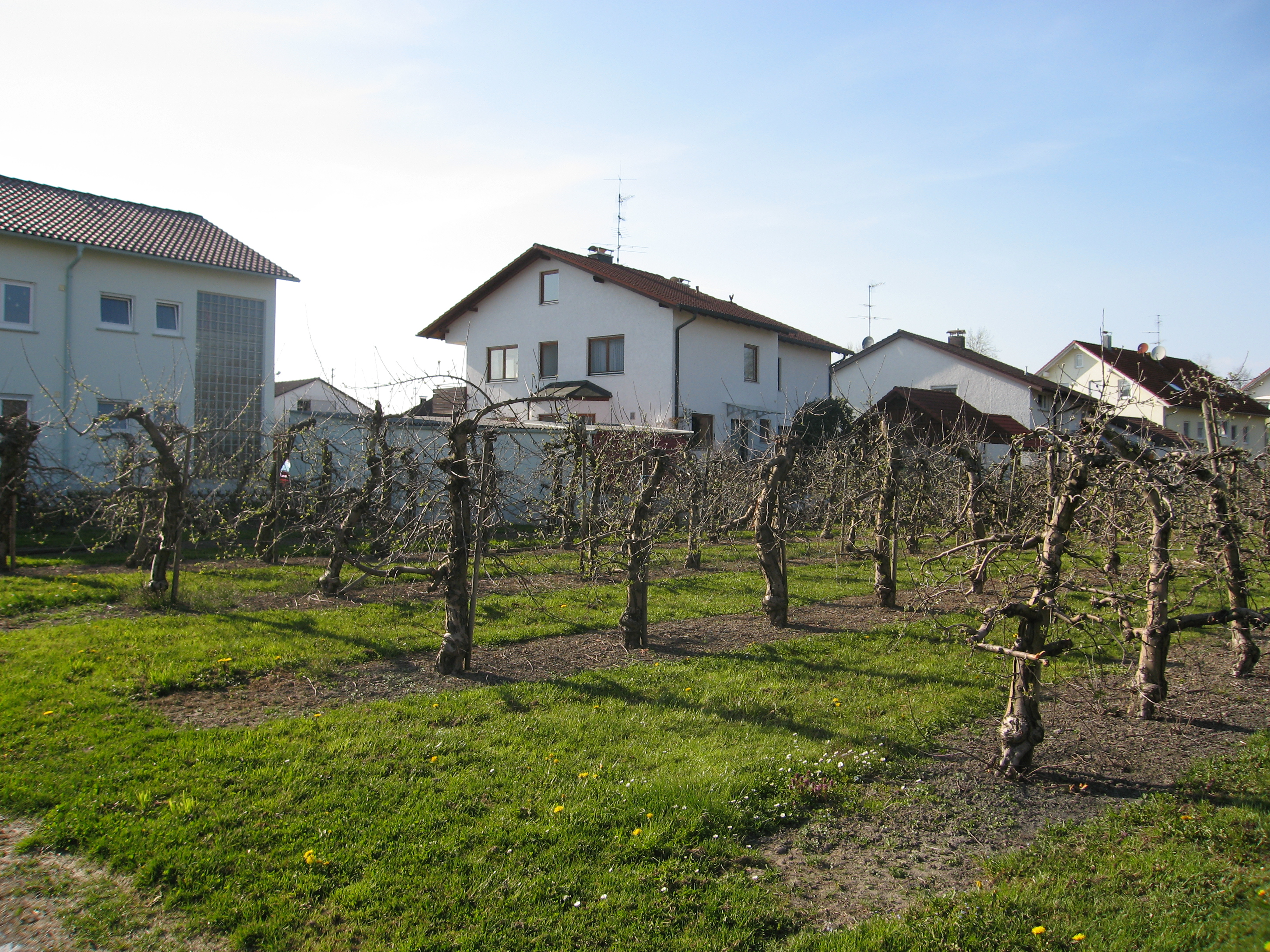 Obstgarten mit Wohngebiet im Hintergrund in Kau, Stadtteil von Tettnang.